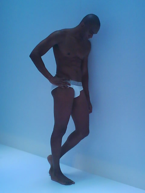 內衣模特兒